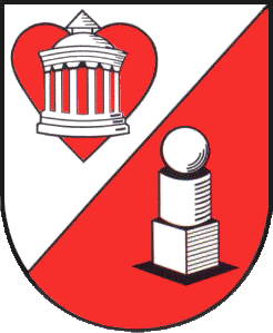 Wappen der Stadt Bad Liebenstein